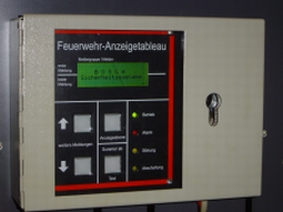 Das Bild zeigt ein Feuerwehr Anzeigetableau. Aufgenommen in der BMA des Hessischen Staatstheaterts in Wiesbaden